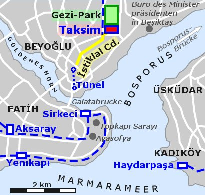 Lage von Gezi-Park, Unabhängigkeitsstaße und Taksim-Platz in Istanbul mit Beyoğlu, Fatik, Kadıköy und Üsküdar